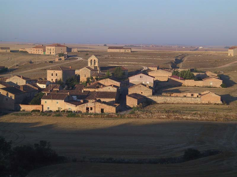 Vista general Avellanosa Oeste